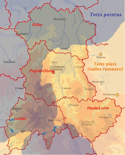 Carte des toits en Auvergne. Bleu : toits pointus, orange : toits plats à tuile romane.(in Hanotaux, 1920, t. I, p.440)